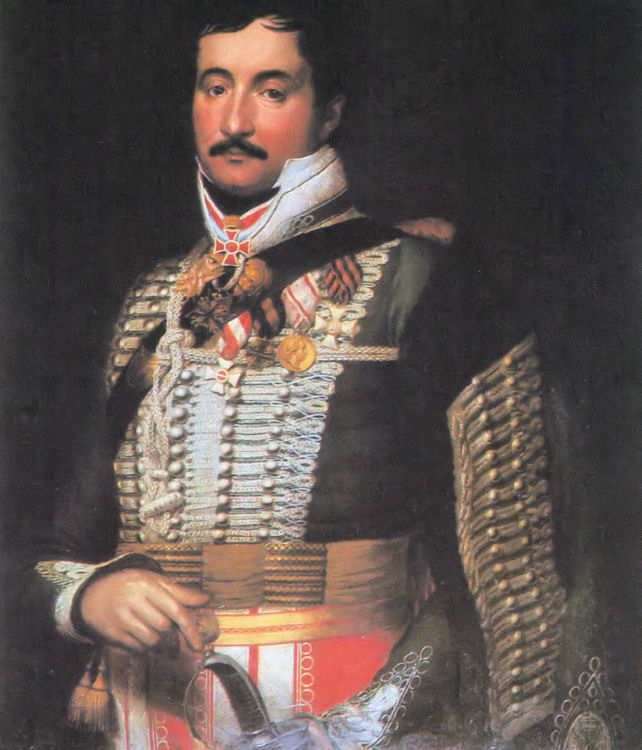 Simonyi József, ismertebb nevén Simonyi óbester, legendás hírű huszártiszt.